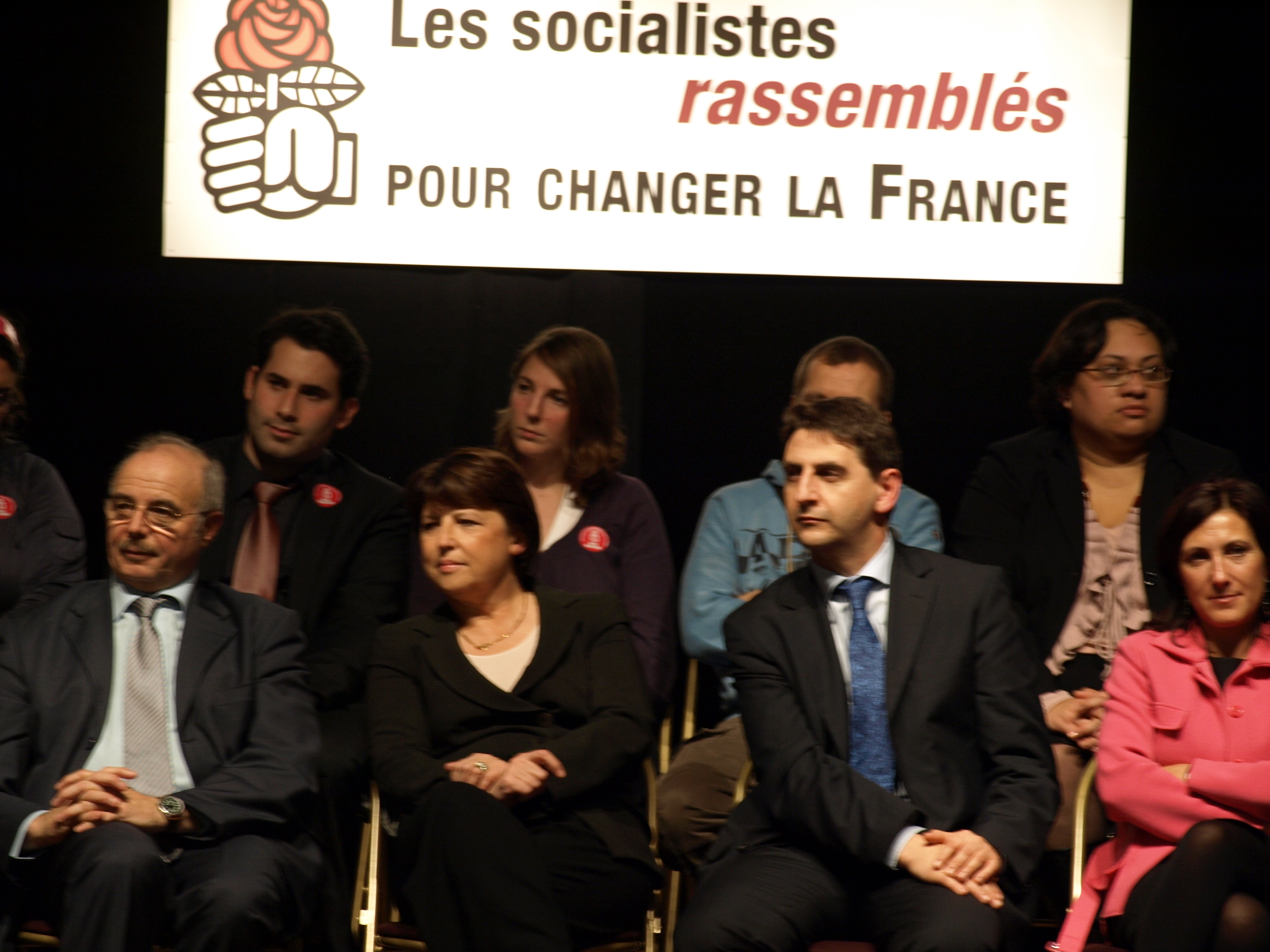 De gauche à droite: Jacques Salvator, Martine Aubry et Daniel Goldberg.